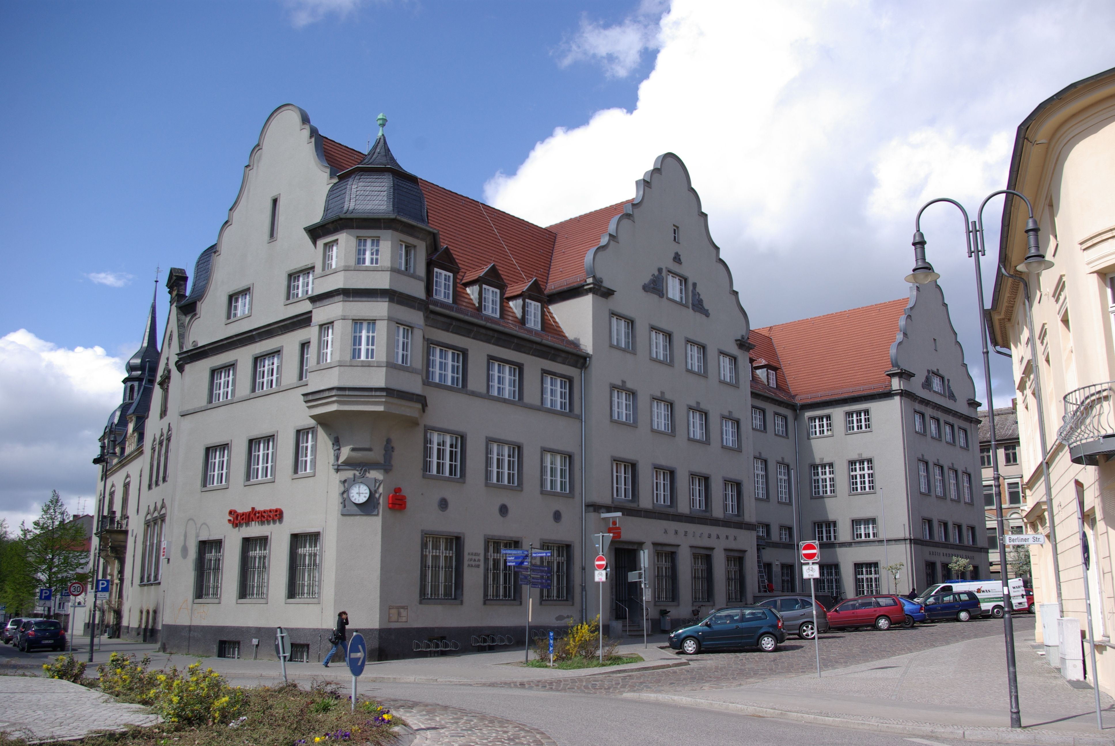 Nauen in Brandenburg. Das Landratsmat steht in der Goethestraße 59-60 gegenüber dem Rathaus. Das Haus steht untger Denkmalschutz.